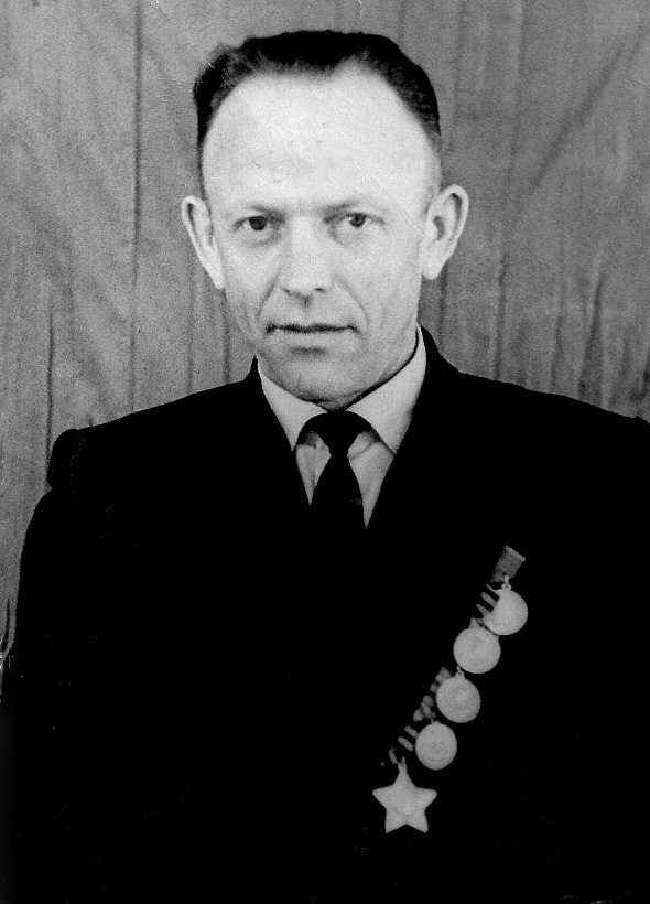 Просвирнин Всеволод Дмитриевич (родился в 1921 году). Служить в Красной Армии стал еще до войны в 1940 году в стрелковом полку в Полтаве...После войны вернулся воин в родное село, работал в Новодевиченской школе. Он имеет Орден Славы III степени, медаль «За оборону Москвы».